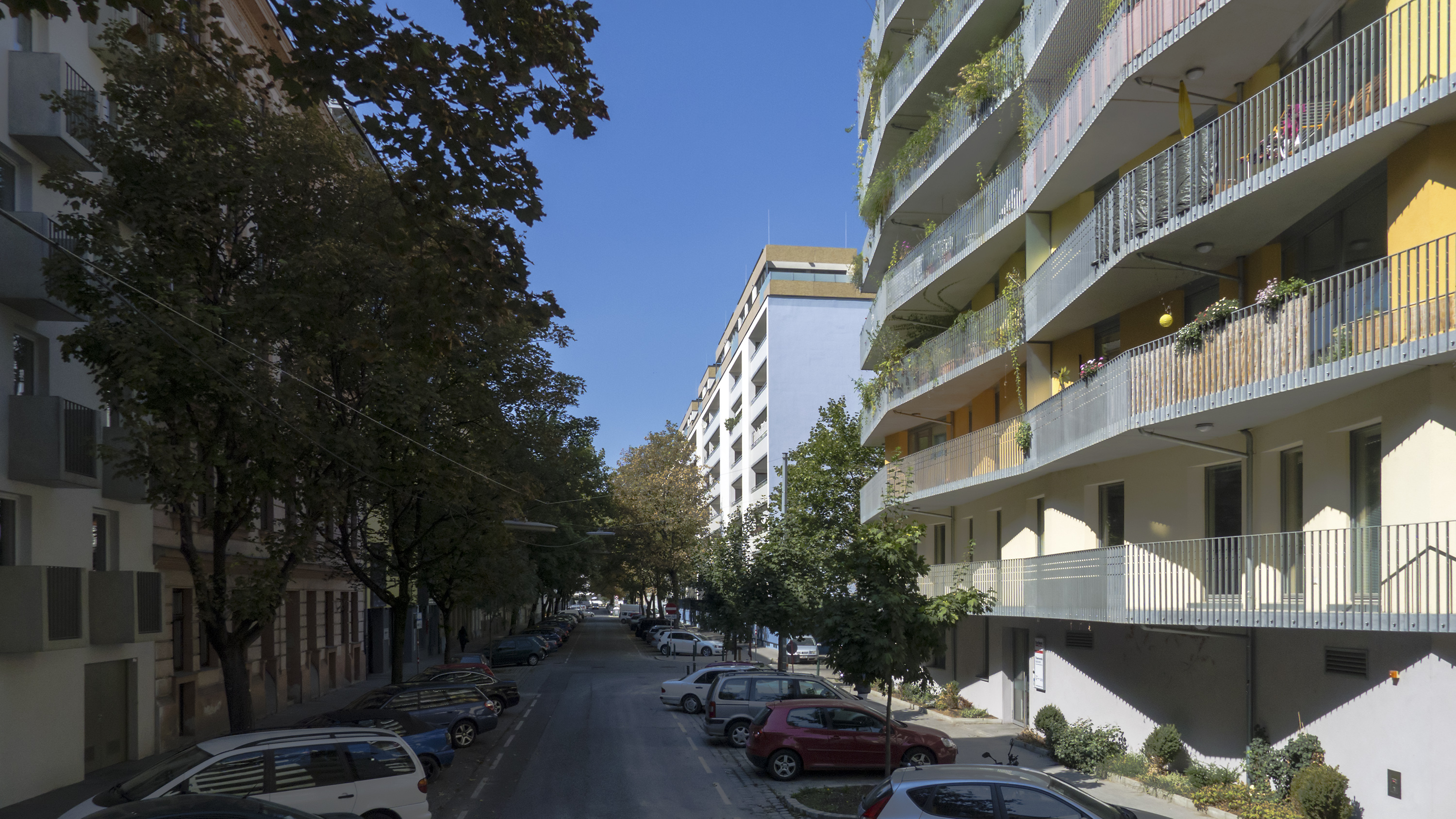 Universumstraße in Wien 20 bei Nr. 31 Richtung Nordwesten